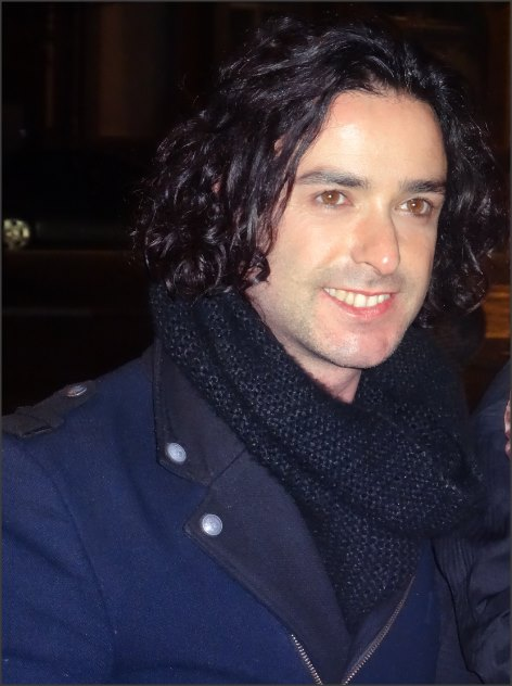 Arno Santamaria en 2014